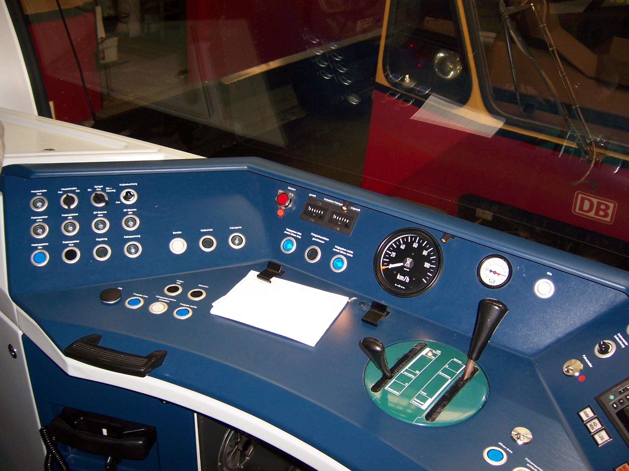 Baureihe 481 der S-Bahn Berlin, Führerstand